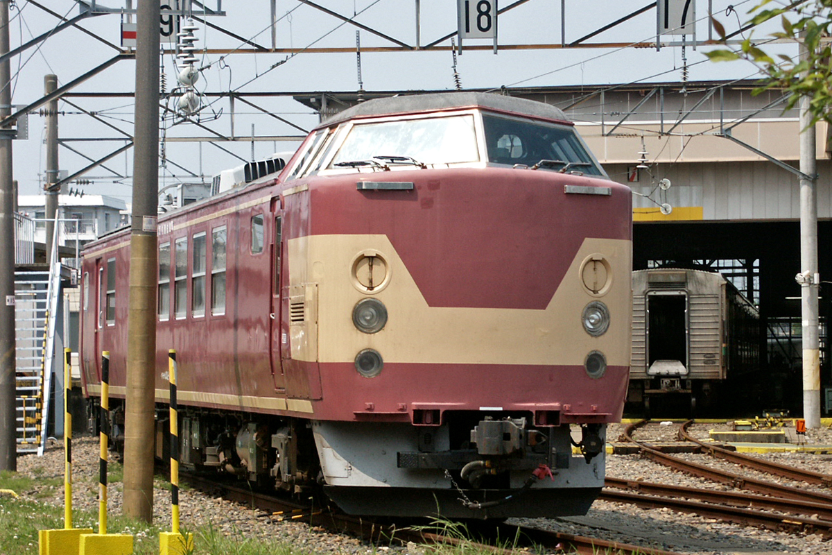 勝田電車区443系（2003年）